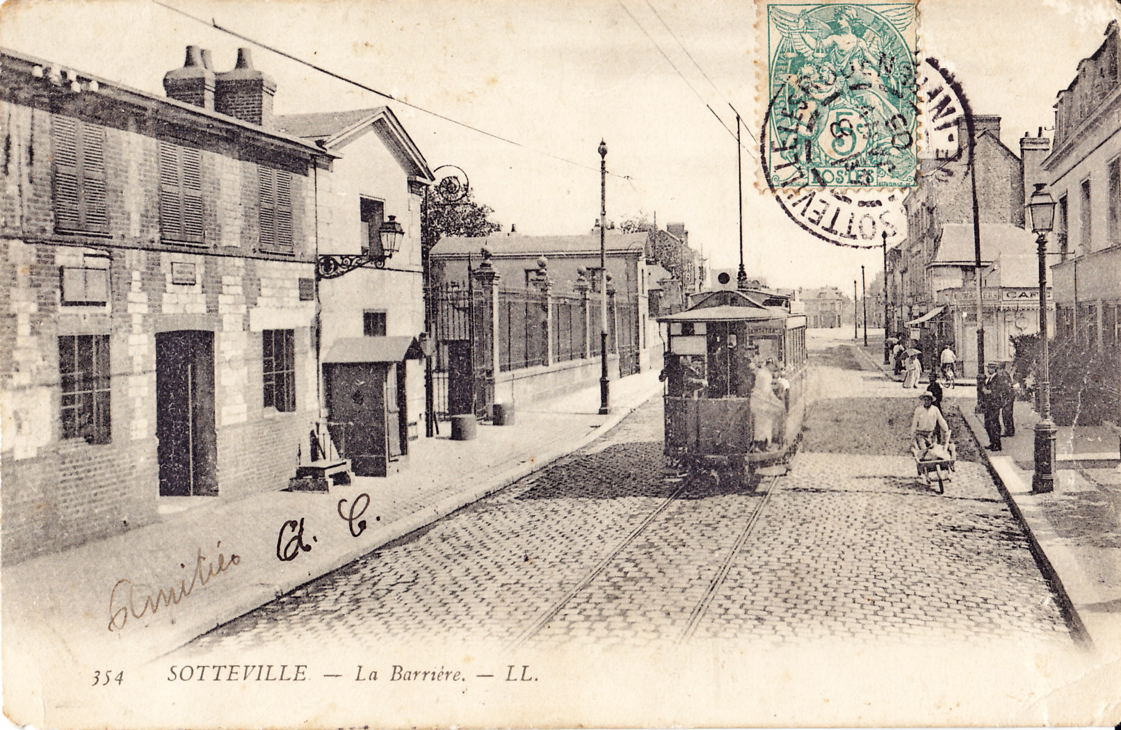 Carte postale ancienne éditée par LL, n° 354 :SOTTEVILLE - La Barrière